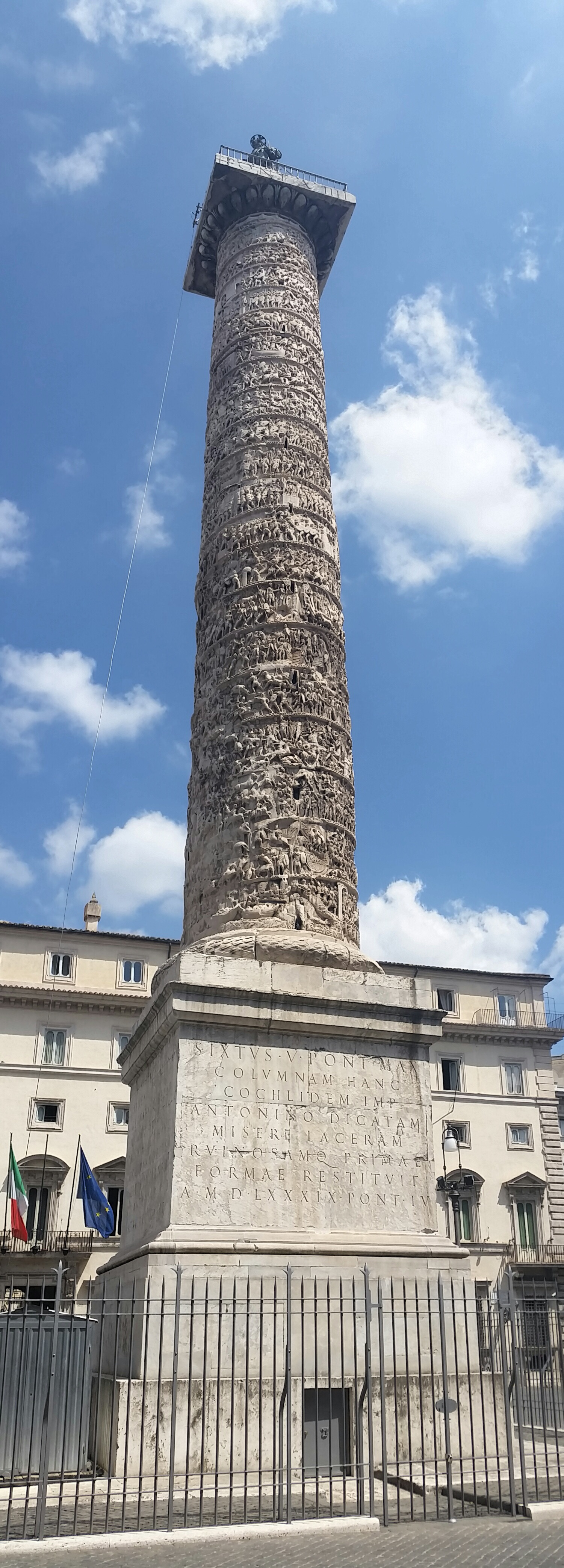 Colonna di Marco Aurelio, con Palazzo Chigi sullo sfondo.